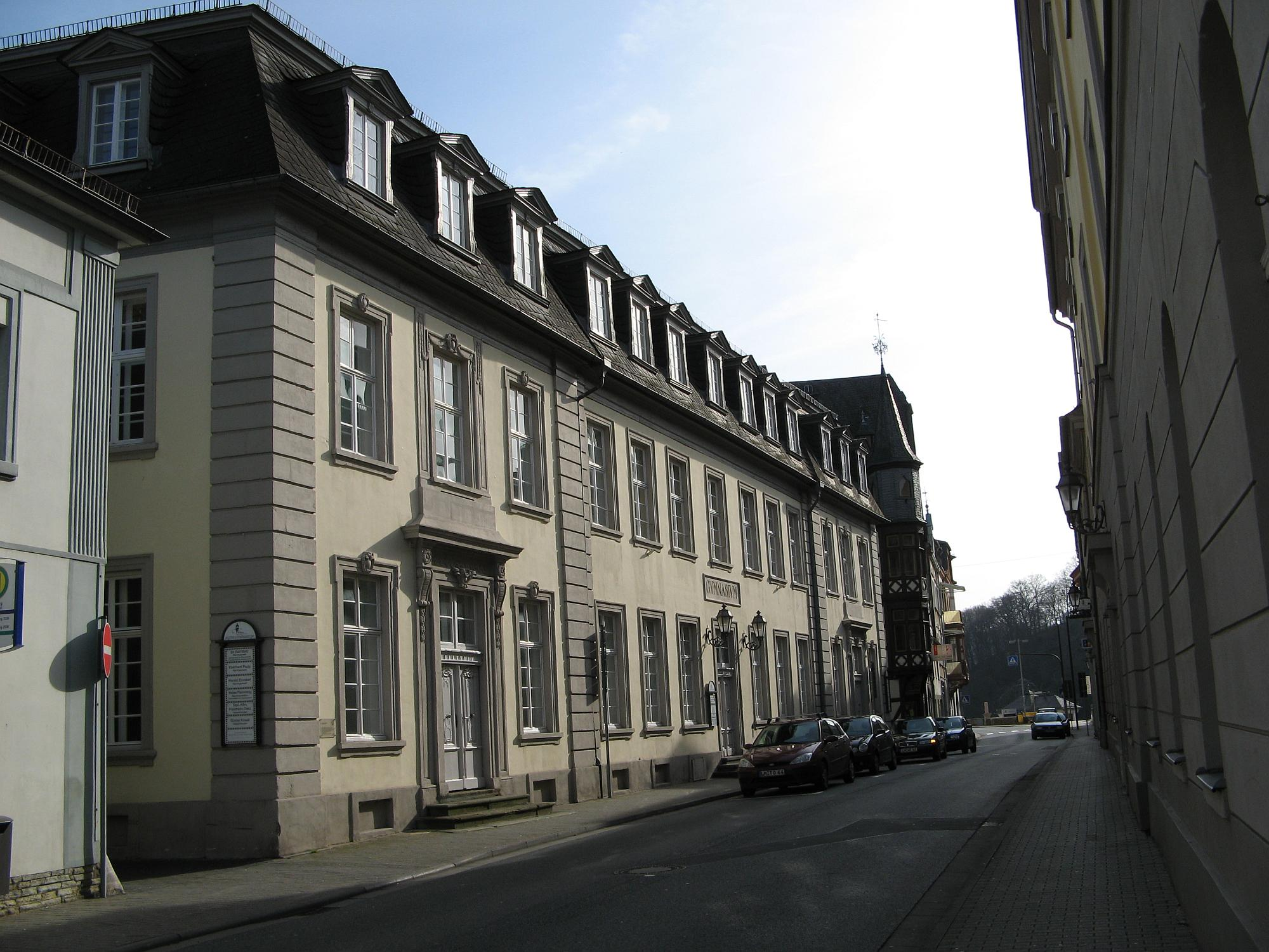 Das Alte Gebäude des Weilburger Gymnasium Philippinum (errichtet 1776), heute Kreis- und Stadtbücherei